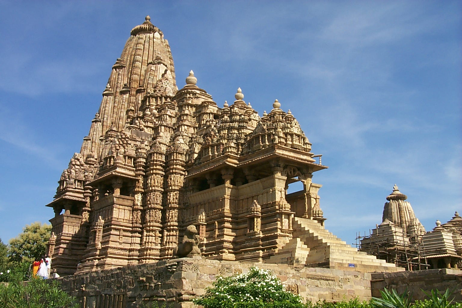 Temple at Khajuraho, Madhya Pradesh, India